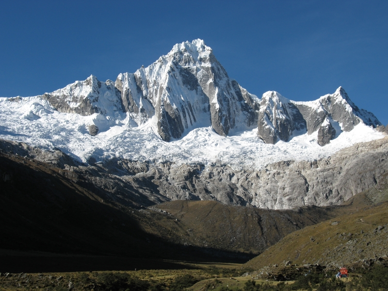 Taulliraju mountain in Huascarán National Park in Peru